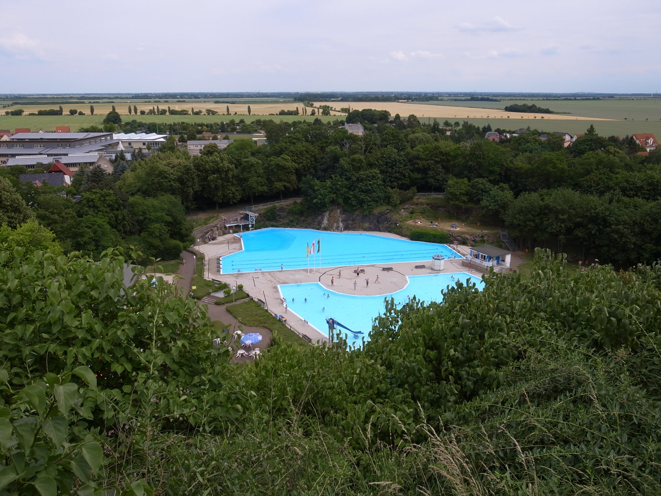 Landsberg (Saalekreis), Felsenbad, Aussicht vom Kapellenberg